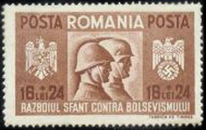 Почтовая марка Румынии. Братство по оружию с Германией